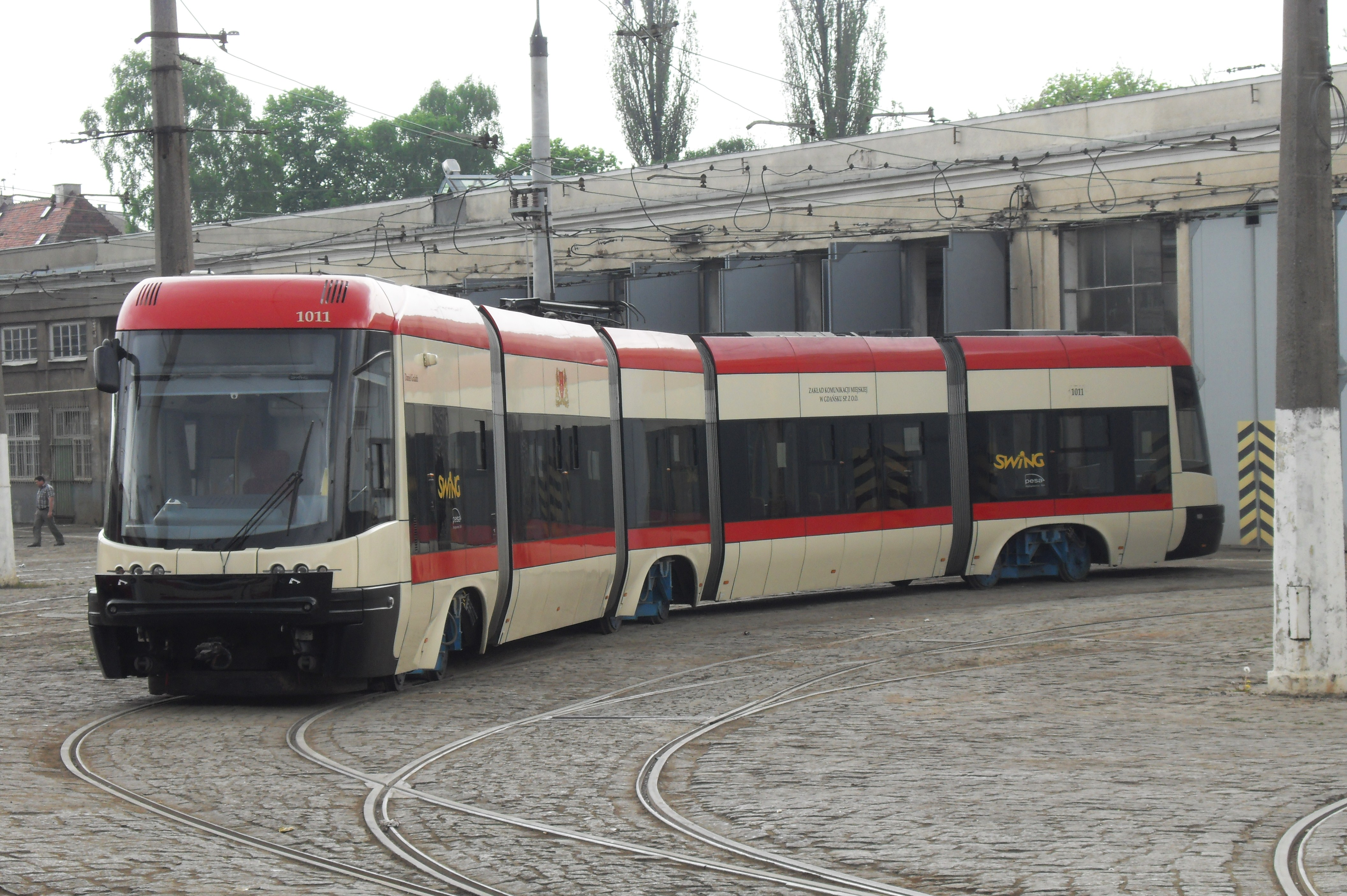 Zajezdnia Gdańsk Strzyża. PESA 120Na na niebieskich wózkach.